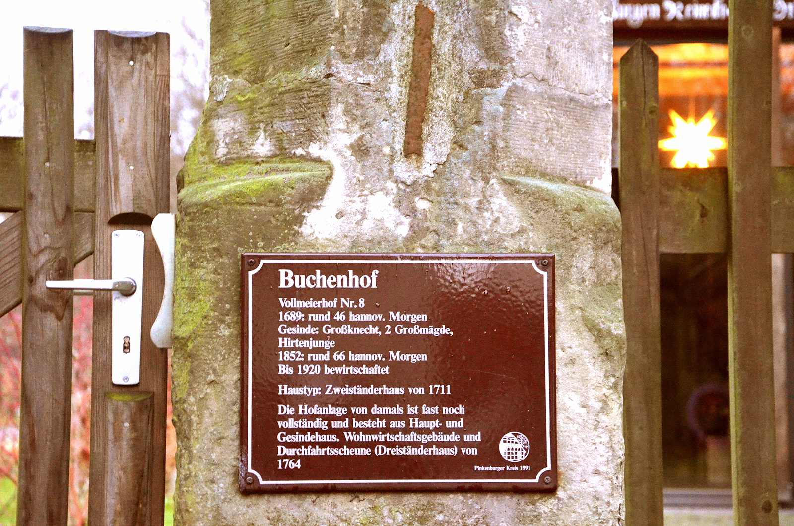 1991 angebrachte Infotafel des Pinkenburger Kreises an der Toreinfahrt zu den Gebäuden unter der (heutigen) Adresse Kapellenbrink 6 und 8 in Hannover, Stadtteil Groß-Buchholz: „Buchenhof / Vollmeierhof Nr. 8 / 1689: rund 46 hann. Morgen / Gesinde: Großknecht, 2 Großmägde, Hirtenjunge / 1852: rund 66 hann. Morgen / Bis 1920 bewirtschaftet / Haustyp: Zweiständerhaus von 1711 / Die Hofanlage von damals ist noch fast vollständig und besteht aus Haupt- und Gesindehaus, Wohnwirtschaftsgebäude und Durchfahrtsscheune (Dreiständerhaus) von 1764“